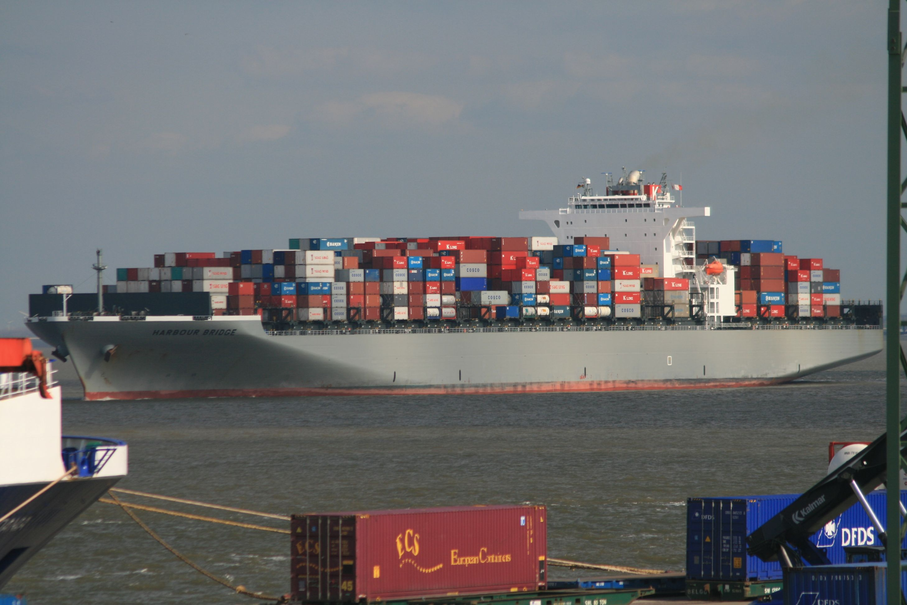 "Harbour Bridge" (9.040 TEU, 12,00 m Salzwassertiefgang) am CUXPORT am 18. April 2008 bei Glameyer Stack IMO Number: 9302152 MMSI Number: 372367000 Callsign: 3EIQ5 Length: 336 m Beam: 46 m